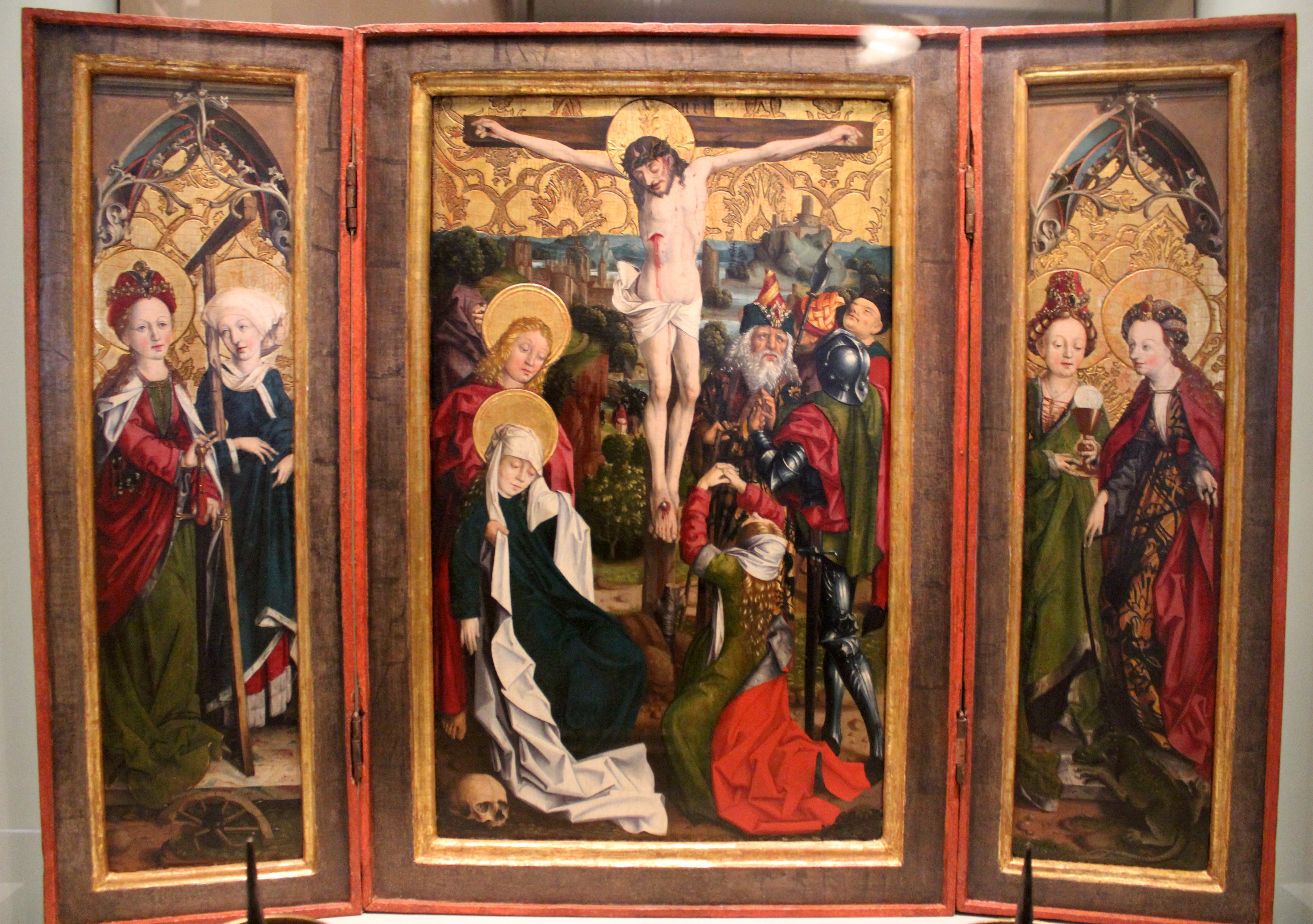 Berlín, Deutsches Historisches Museum. Tríptico de la Crucifixión, Meister der Ilsung Madonna, s. XV.